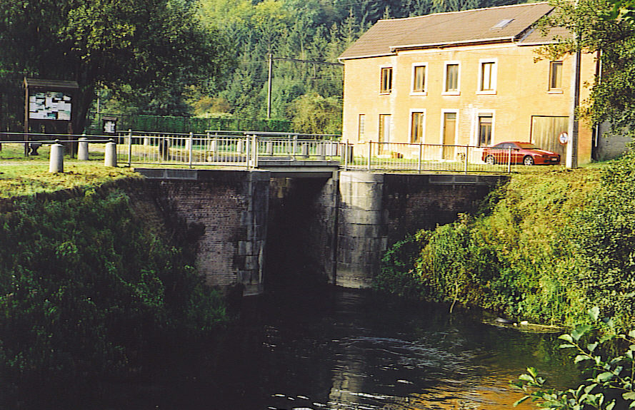 Sluis op het Ourthekanaal te Chanxhe - eigen foto